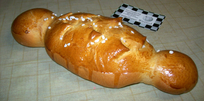 Neujahrsbopp aus einer Rheinhessischen Bäckerei am 31. Dezember 2008 gekauft. Zum Größenvergleich eine Karte im Format ISO 7810, "Kreditkarteformat" (86,6 x 54 mm)